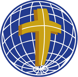 Versión original del logo de Christian Outreach Centre World